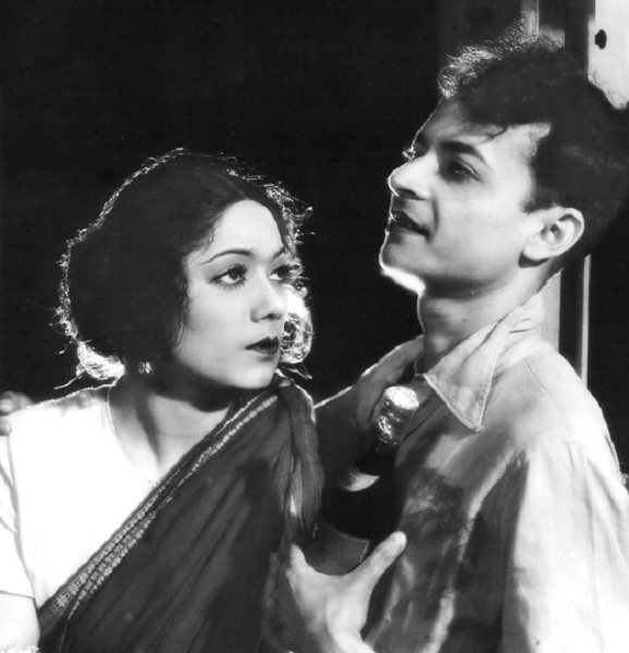 P.C. Barua et Chandrabati Devi dans la version bengalie de Devdas (1935)